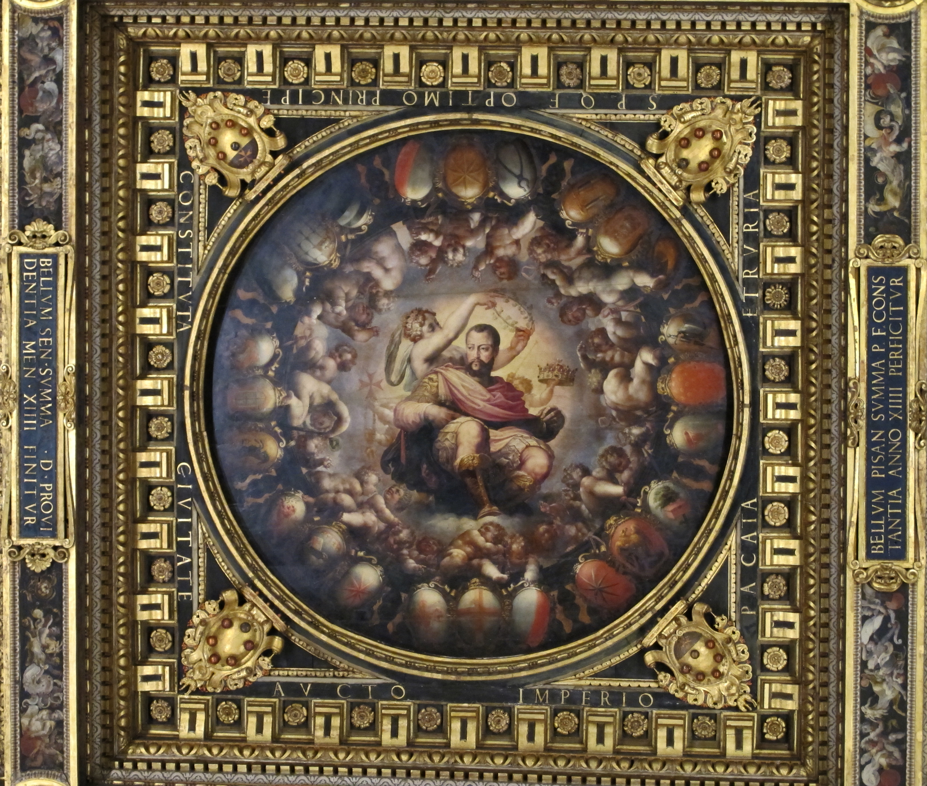 Salone dei Cinquecento, Firenze